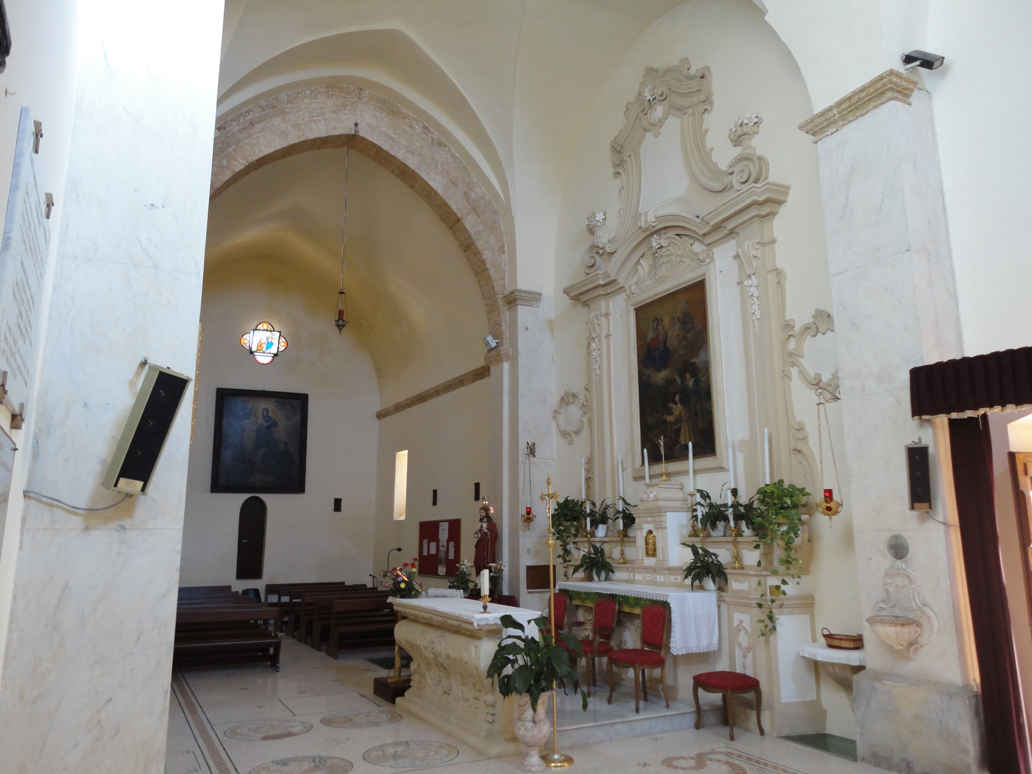 Interno Santa Maria della Strada Taurisano, Lecce